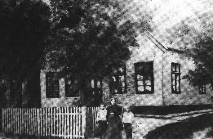 Archiv EFG Varel // vor 1870 // von mir eingescannt // public domain // Benutzer:GregorHelms